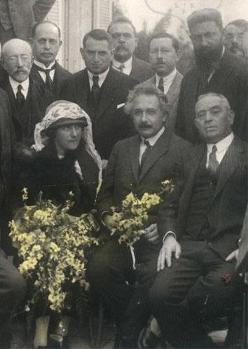 אלברט אינשטיין ורעיתו עם מאיר דיזנגוף תל אביב 1923